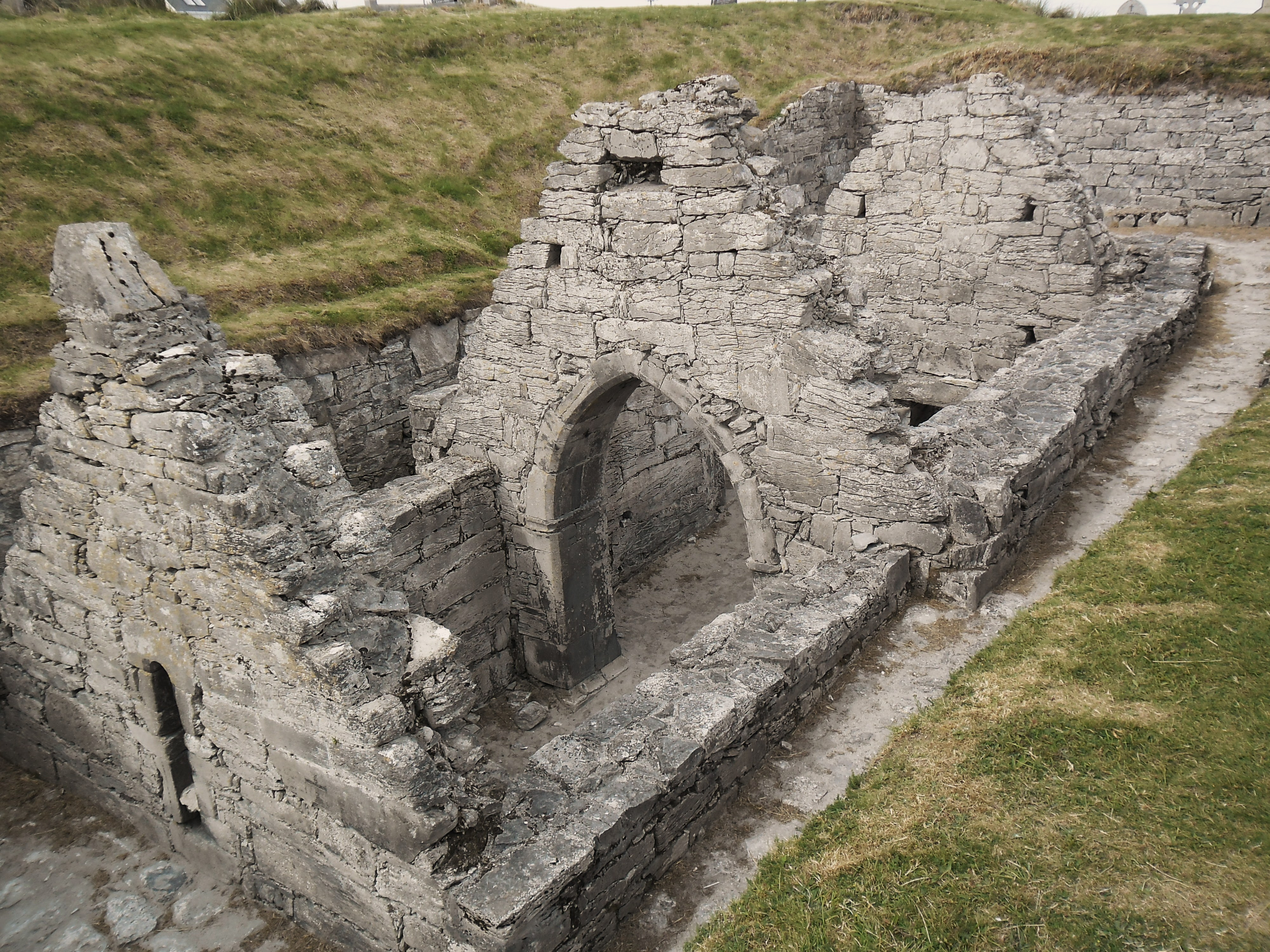 Ruine d'une chapelle, Inisheer, îles d'Aran